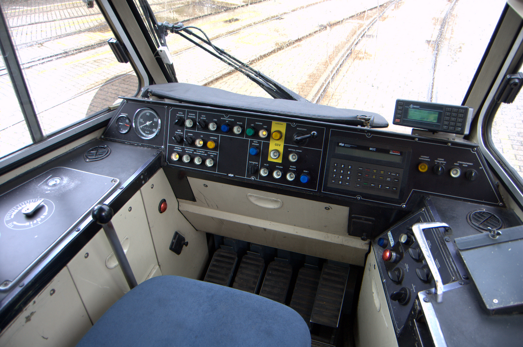 GVB 813.